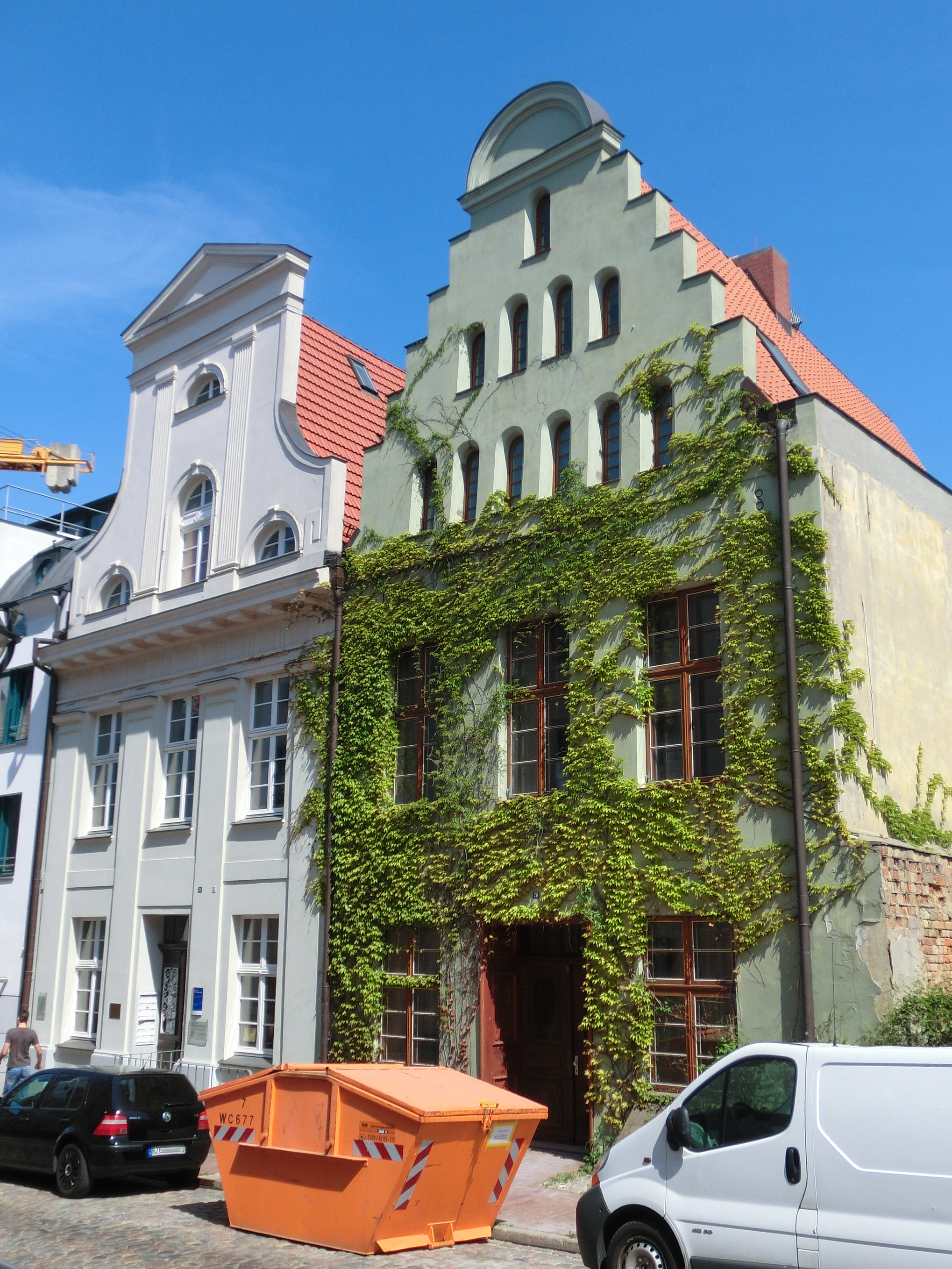 Wohnhäuser (Baudenkmal, Rostock, Kleine Wasserstraße 25-26)